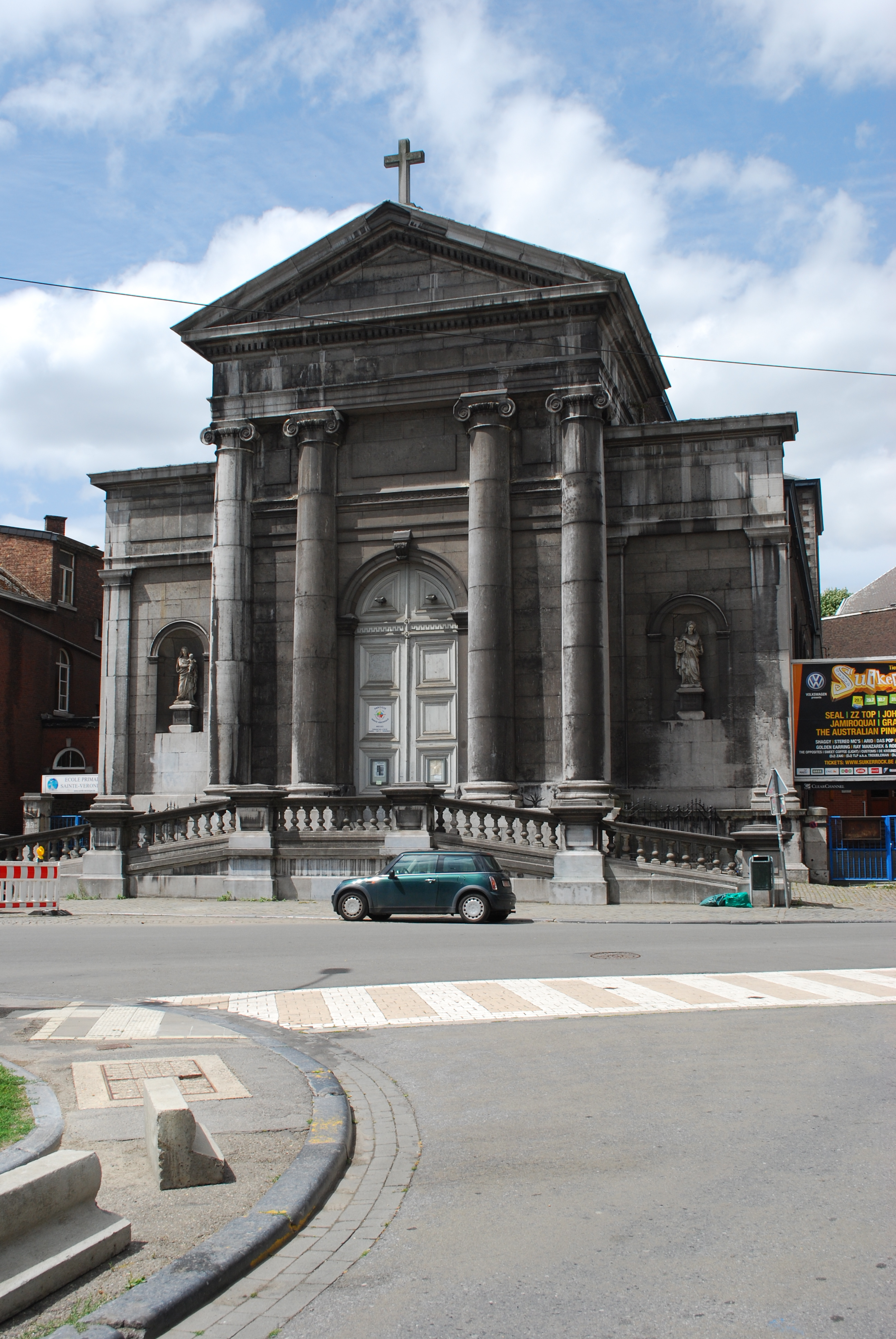 L'église Sainte-Véronique à Liège.